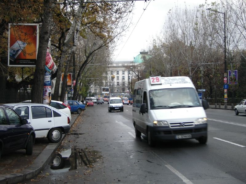 Marshrutka on Vasil Levski Boulevard, Sofia, Bulgaria